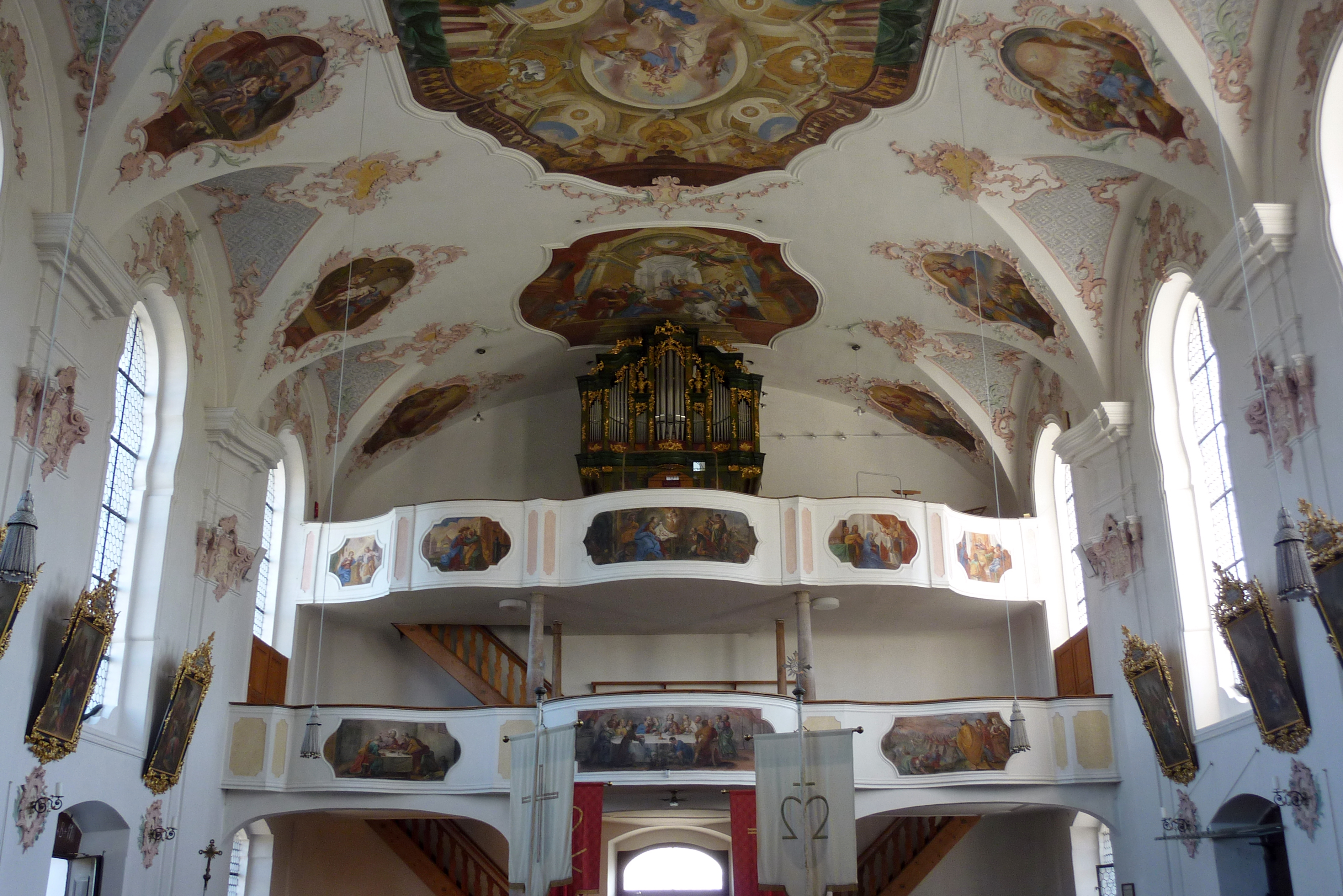 Katholische Pfarrkirche St. Peter in Tapfheim im Landkreis Donau-Ries (Bayern), Doppelempore